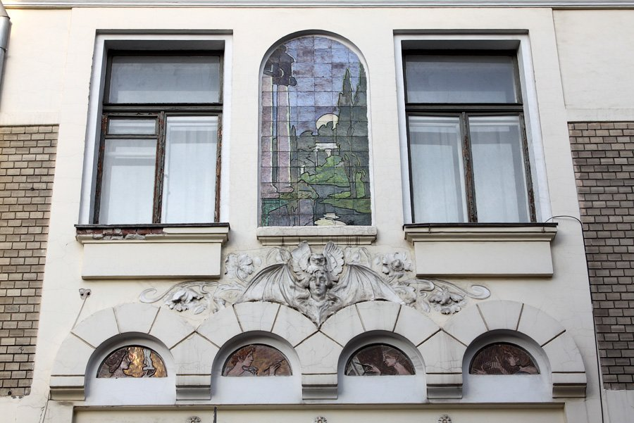 Оформление фасада собственного дома С. У. Соловьёва в Москве по адресу Малый Ржевский переулок, 6. Майоликовое панно "Рим. Форум ночью" по мотивам рисунка Михаила Врубеля, под ним расположен горельеф Афины-Паллады, под ней - полукруглые медальоны по эскизам Марии Якунчиковой.